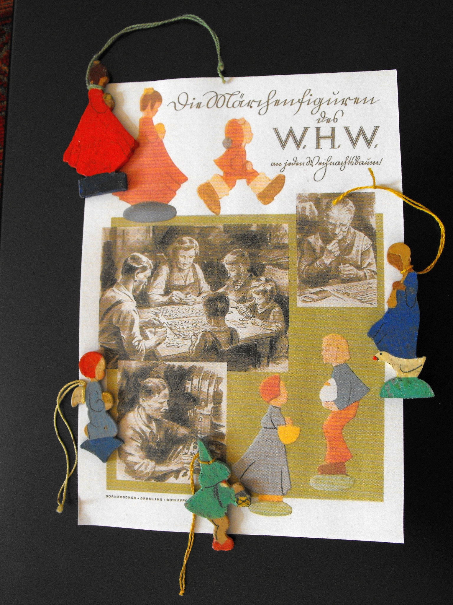 Werbeblatt des Winterhilfswerks (WHW) für die Serie "Märchenfiguren" mit einigen Figuren (Ausstellung: "Weihnachtszeiten" des Aachener Bild-und Tonarchivs e.V (abuta), Dezember 2011)